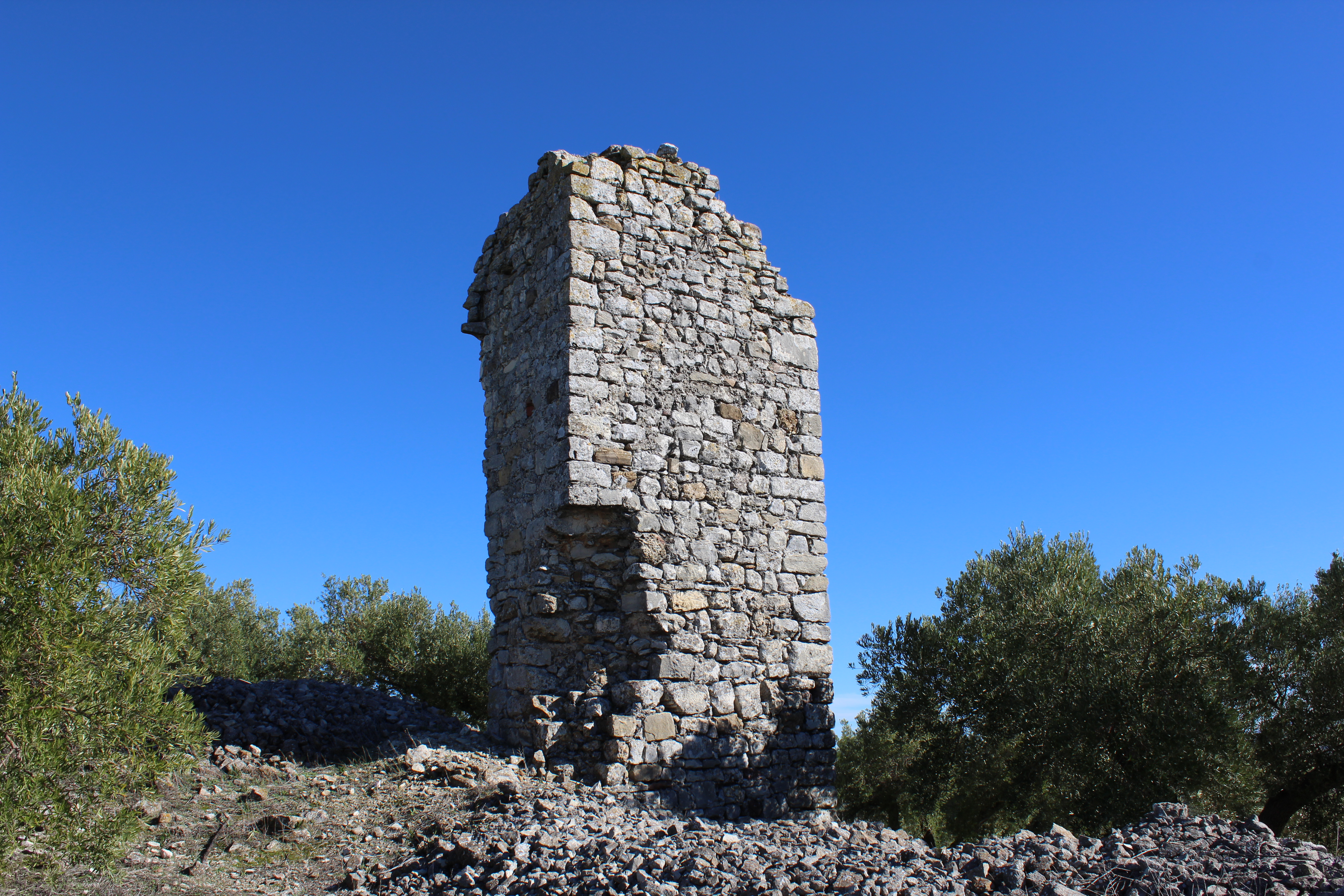 Torre Benzalá entre olivos, término municipal de Torredonjimeno.